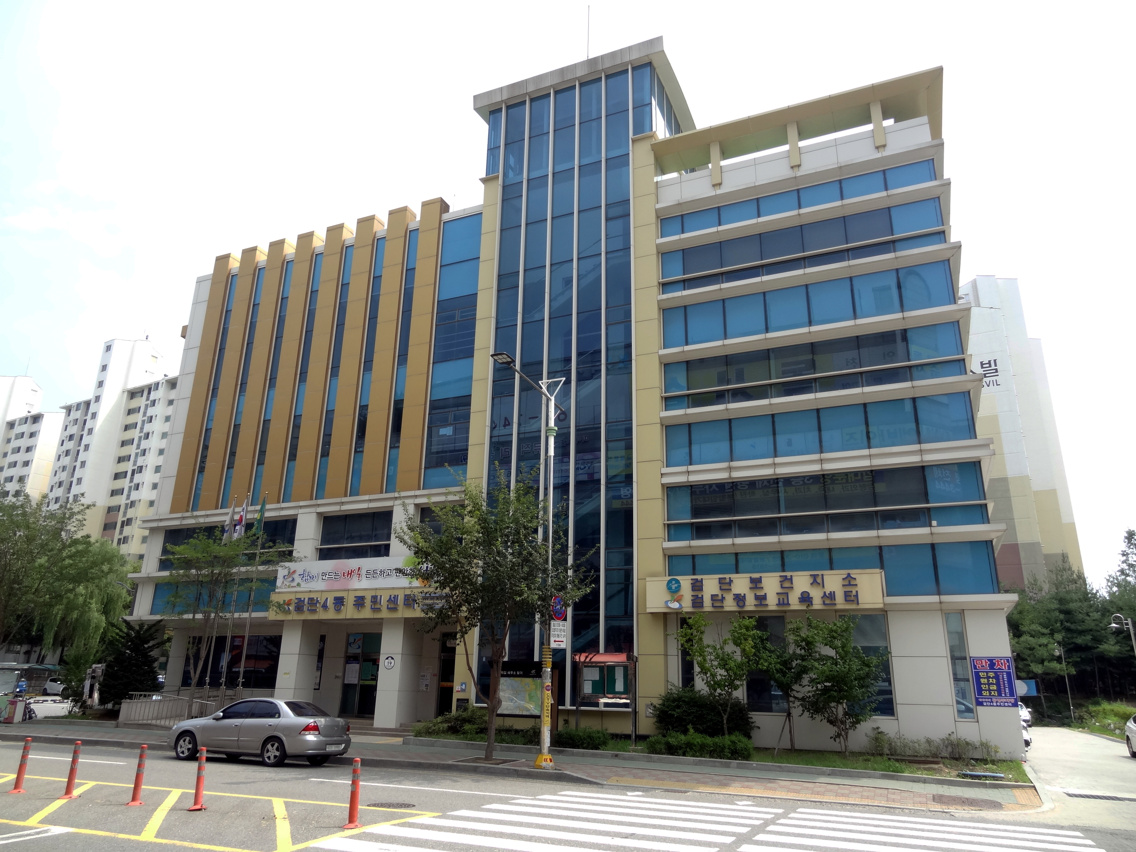 검단4동 주민센터.